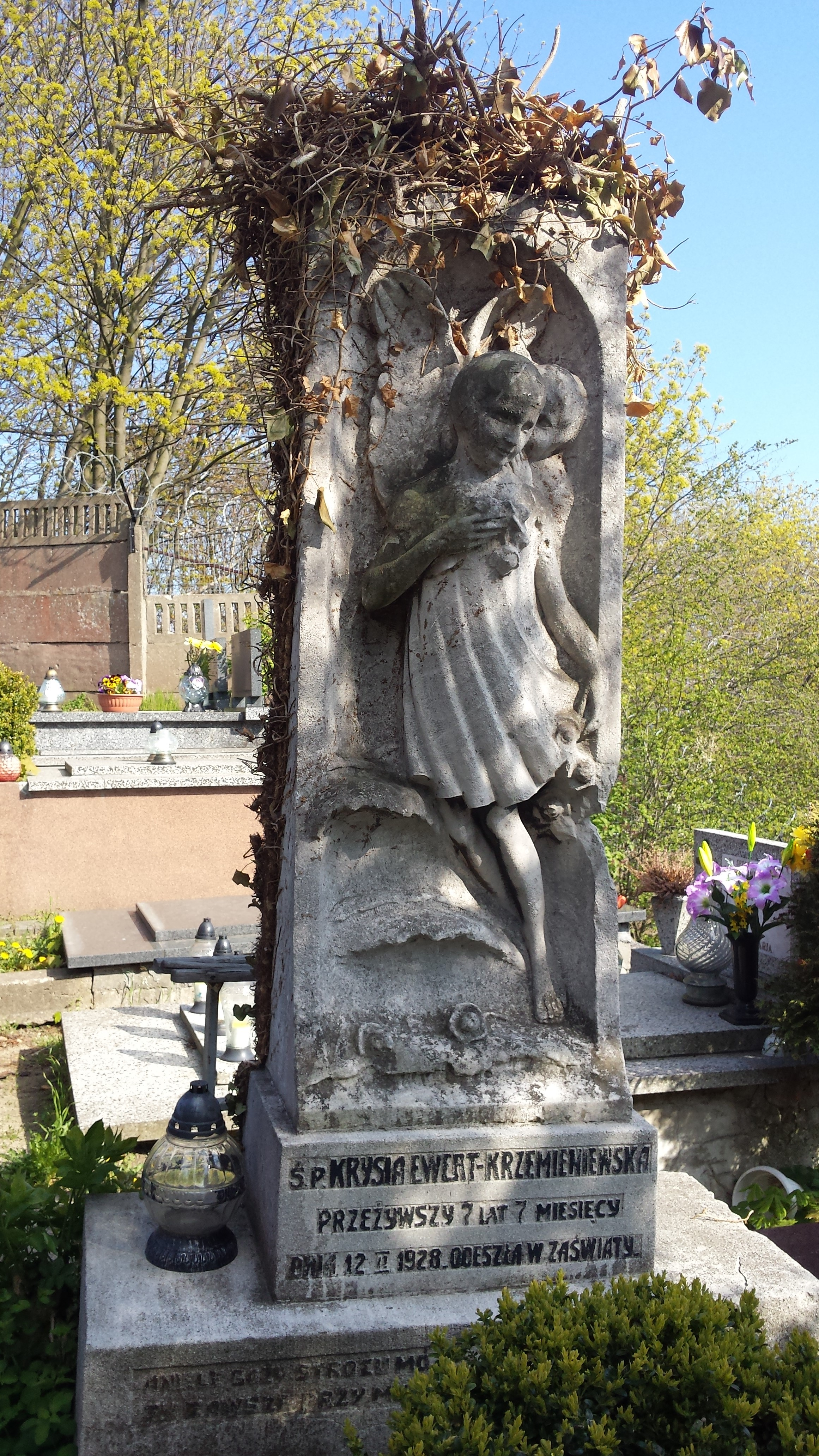 Grób Krystyny Ewert-Krzemieniewskiej na cmentarzu w Gdyni-Oksywiu